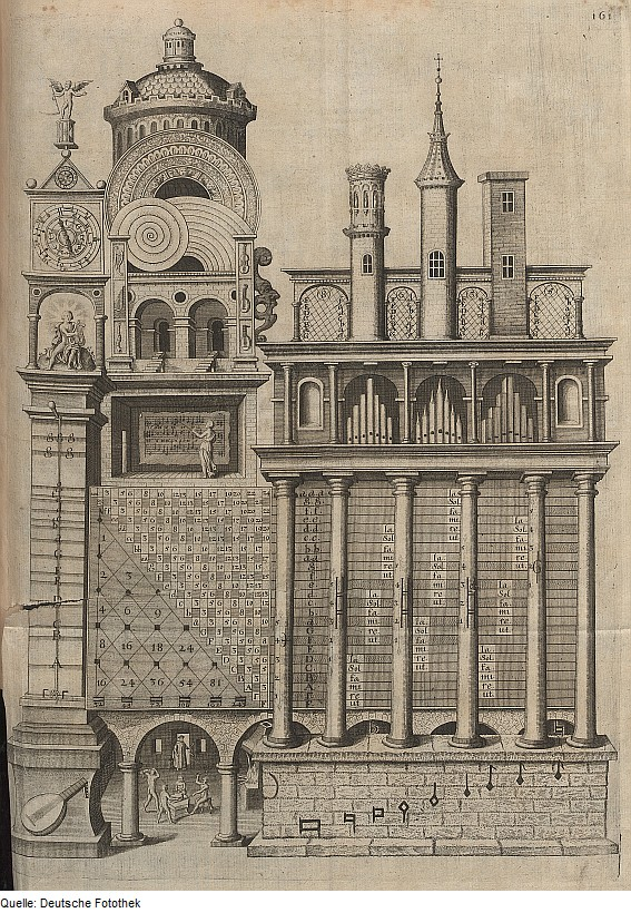 Original image description from the Deutsche Fotothek Musik & Tempel & Orgel & Laute & Harfe